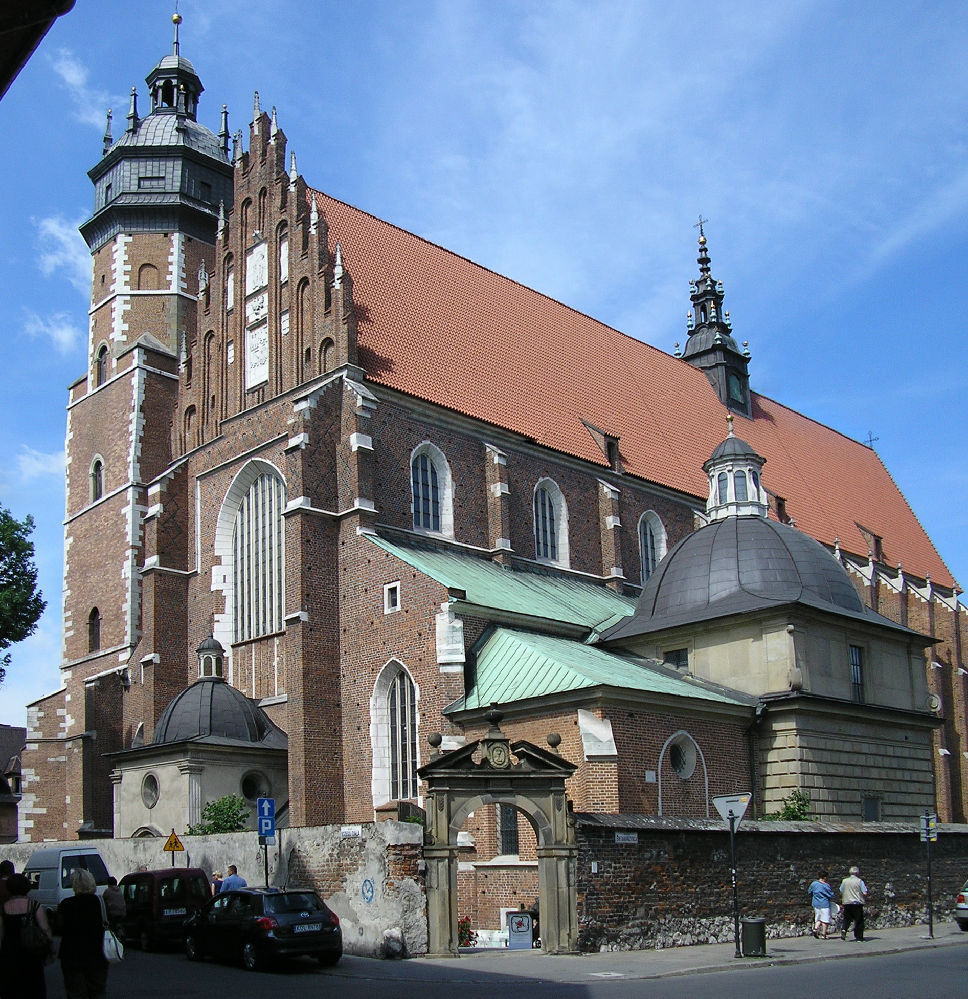 Kościół Bożego Ciała w Krakowie.